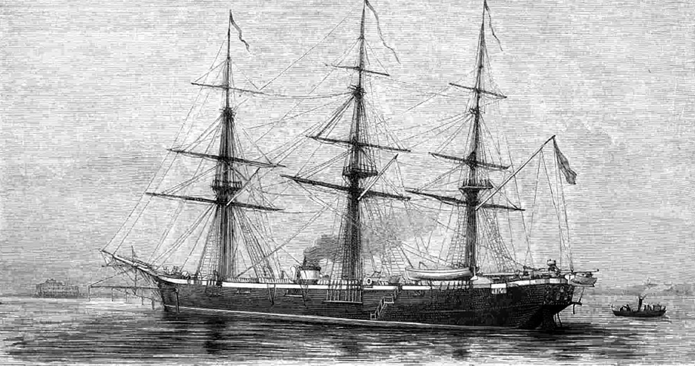 Аскольд в Кронштадте. Рисунок А. Бальдингера по фотографии Г. Перля